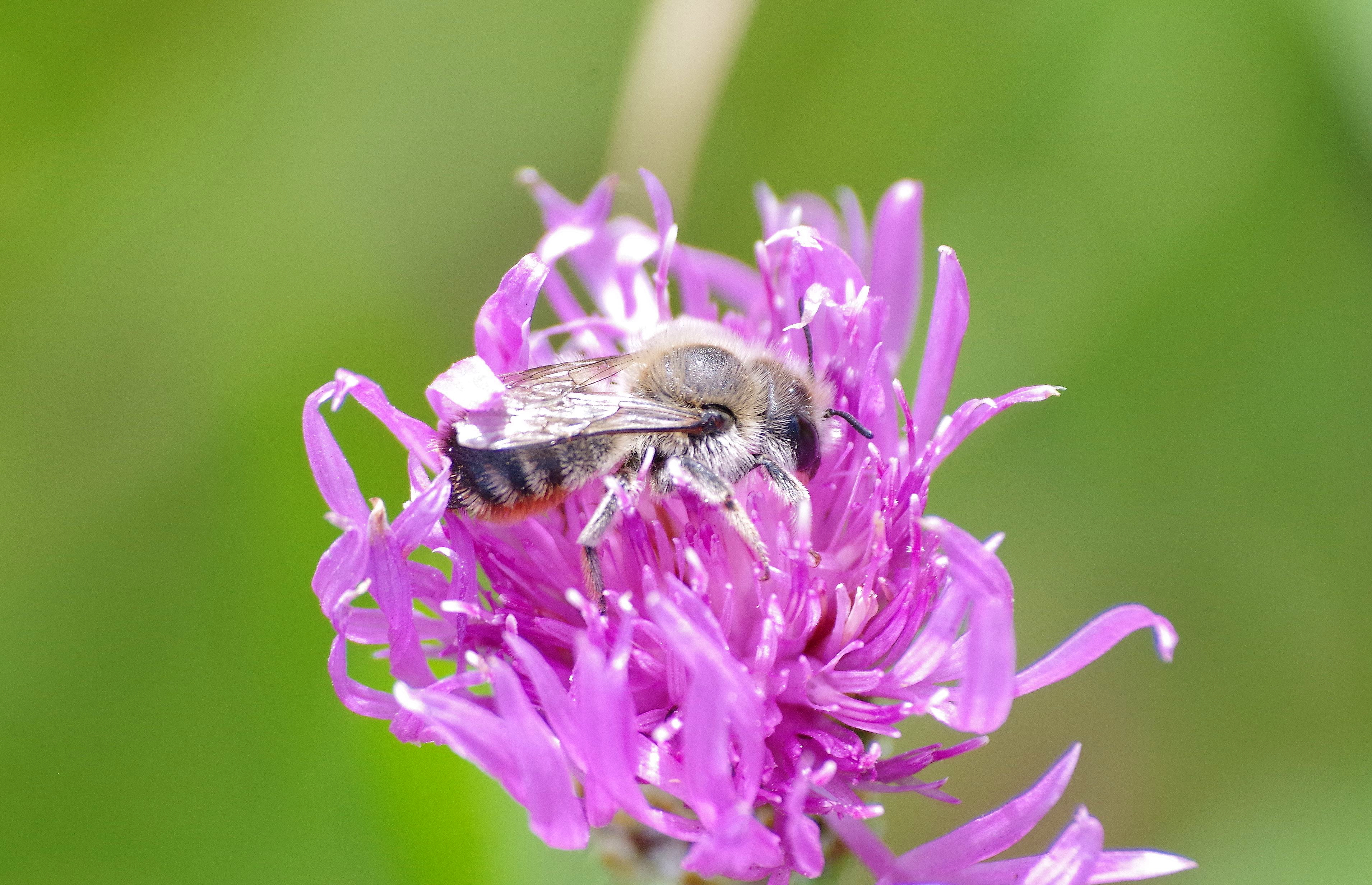 Vzácná samotářská včela A. villosa živící se na rostlině z čeledi Asteraceae.